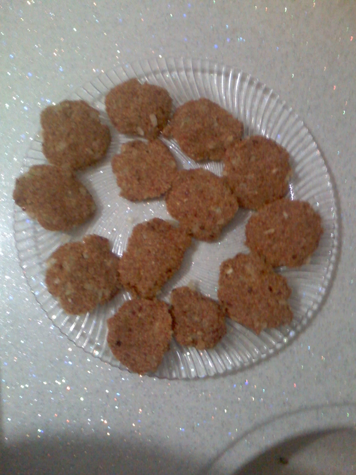 Bir köfte çeşidi, Besmeç.